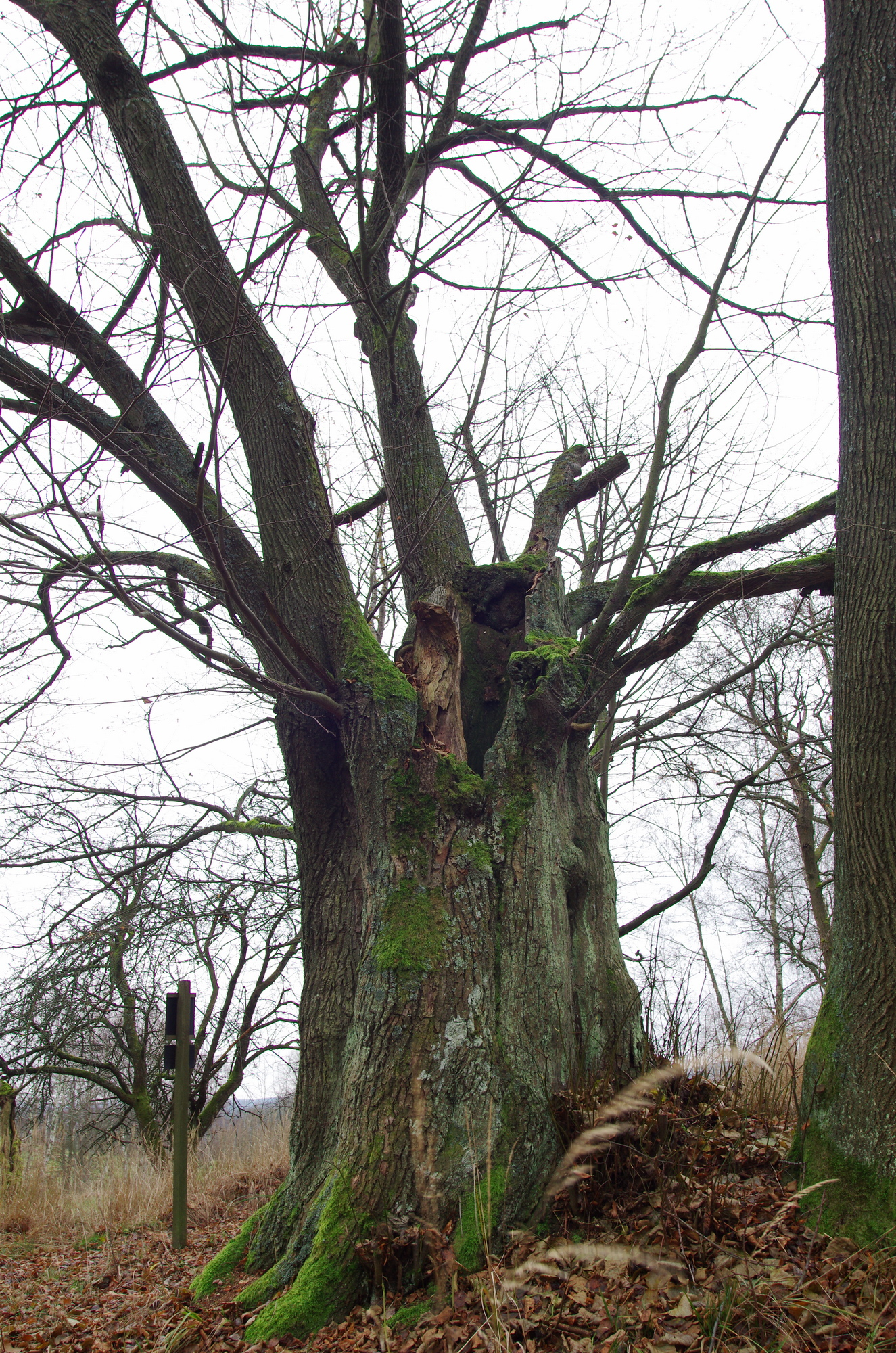 památný strom - Lípa u památníku - Krásná Lípa, okres Sokolov